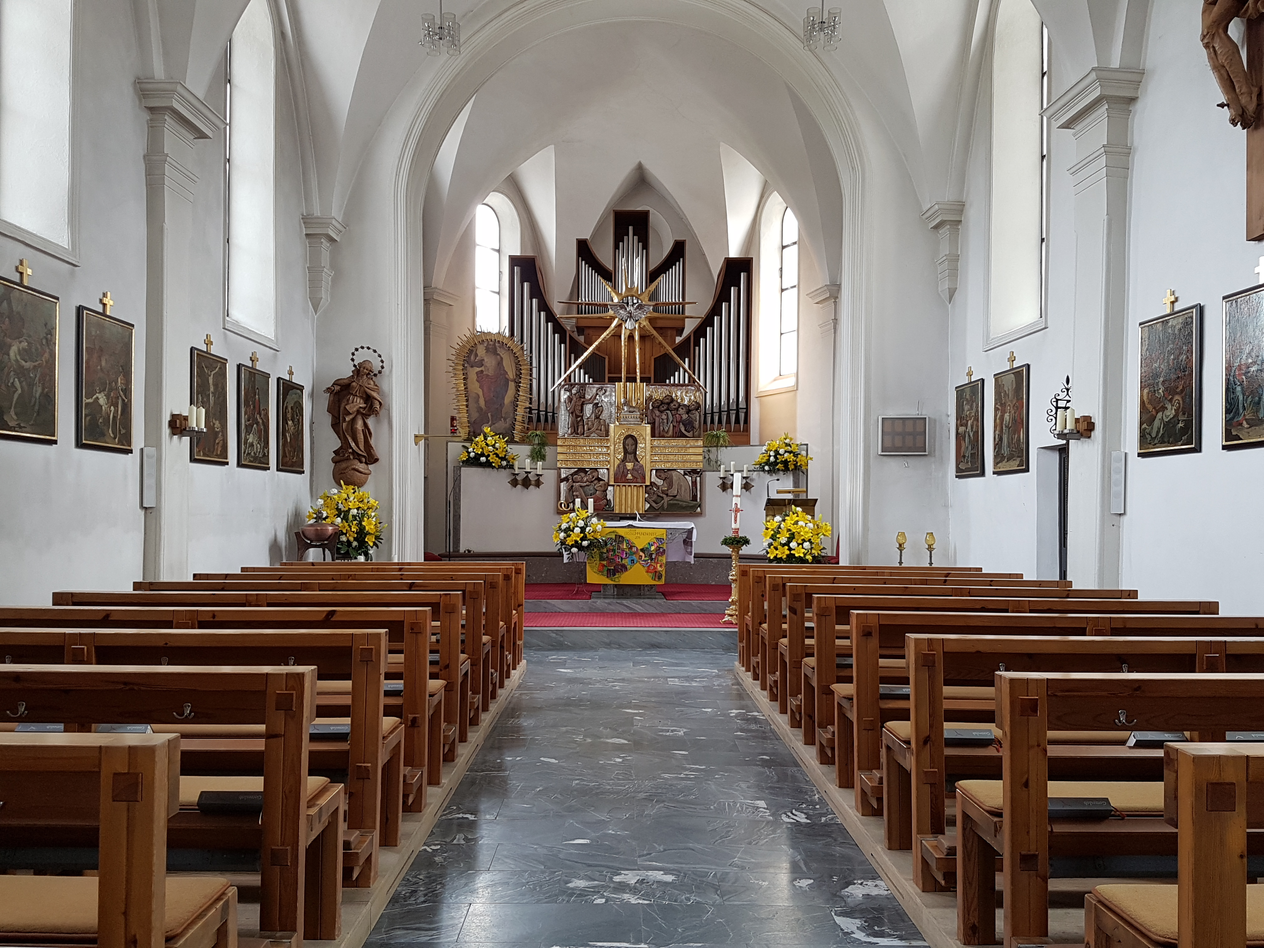 Pfarrkirche St. Martin (Aldrans), Innenraum mit Blick zum Chor